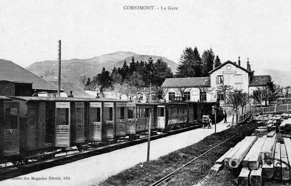 Intérieur de la gare avec train vers 1910